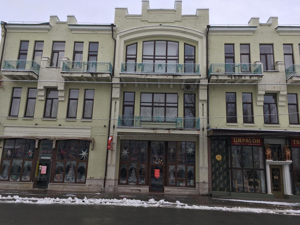 Гостиница «Париж»: проспект Мира, 10 / улица Горького, 15, Владикавказ, Северная Осетия